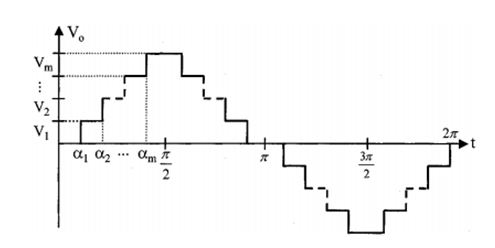 Обобщенная ступенчатая форма сигнала напряжения